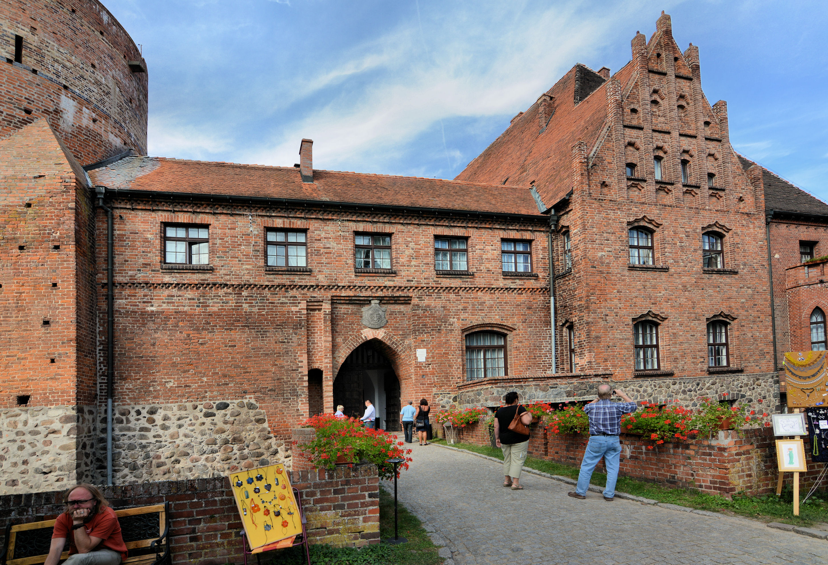 Zamek w Pęzinie